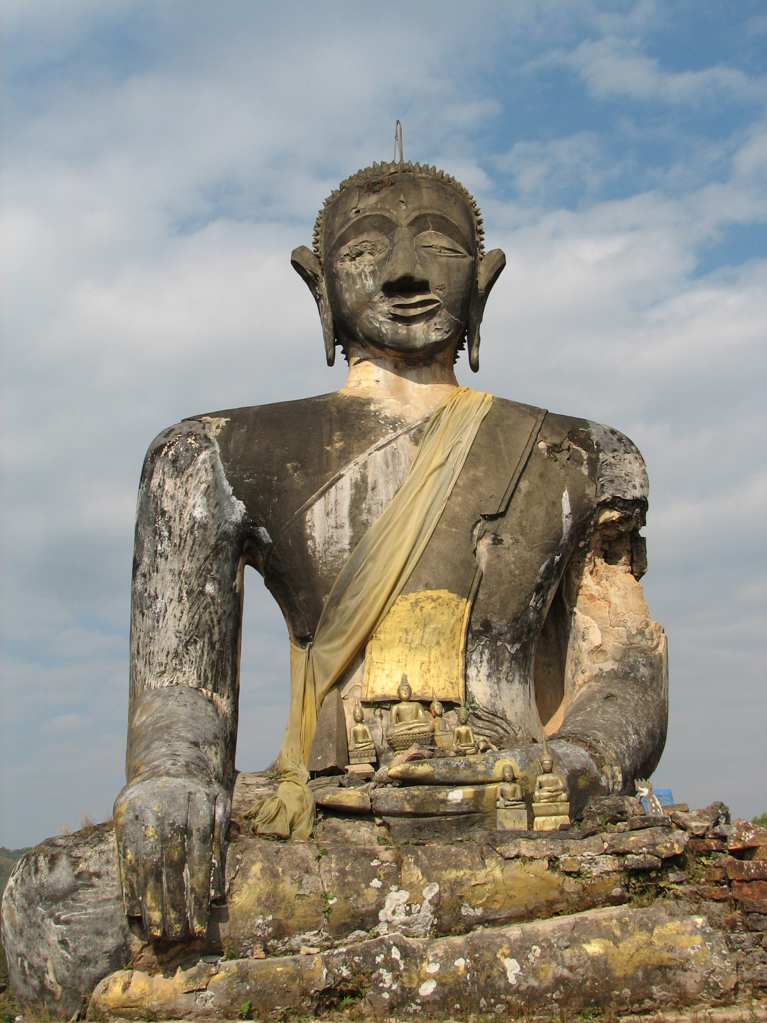 Bombed Buddha